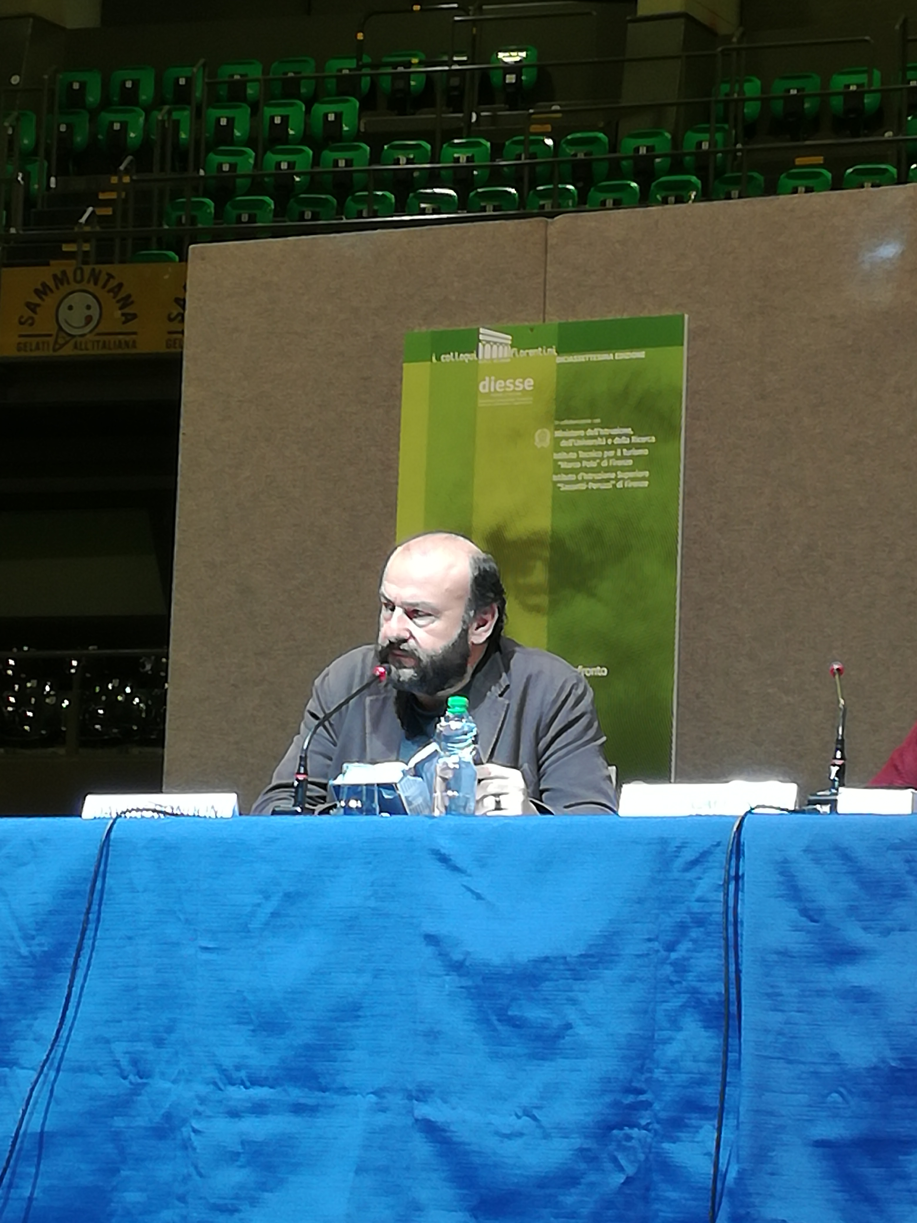 Davide Rondoni legge "La bufera" di Eugenio Montale (da "La bufera e altro", 1956) ai Colloqui Fiorentini 2018